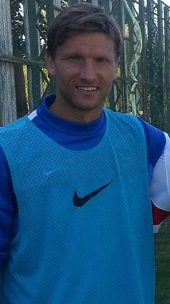 Marius Stankevičius